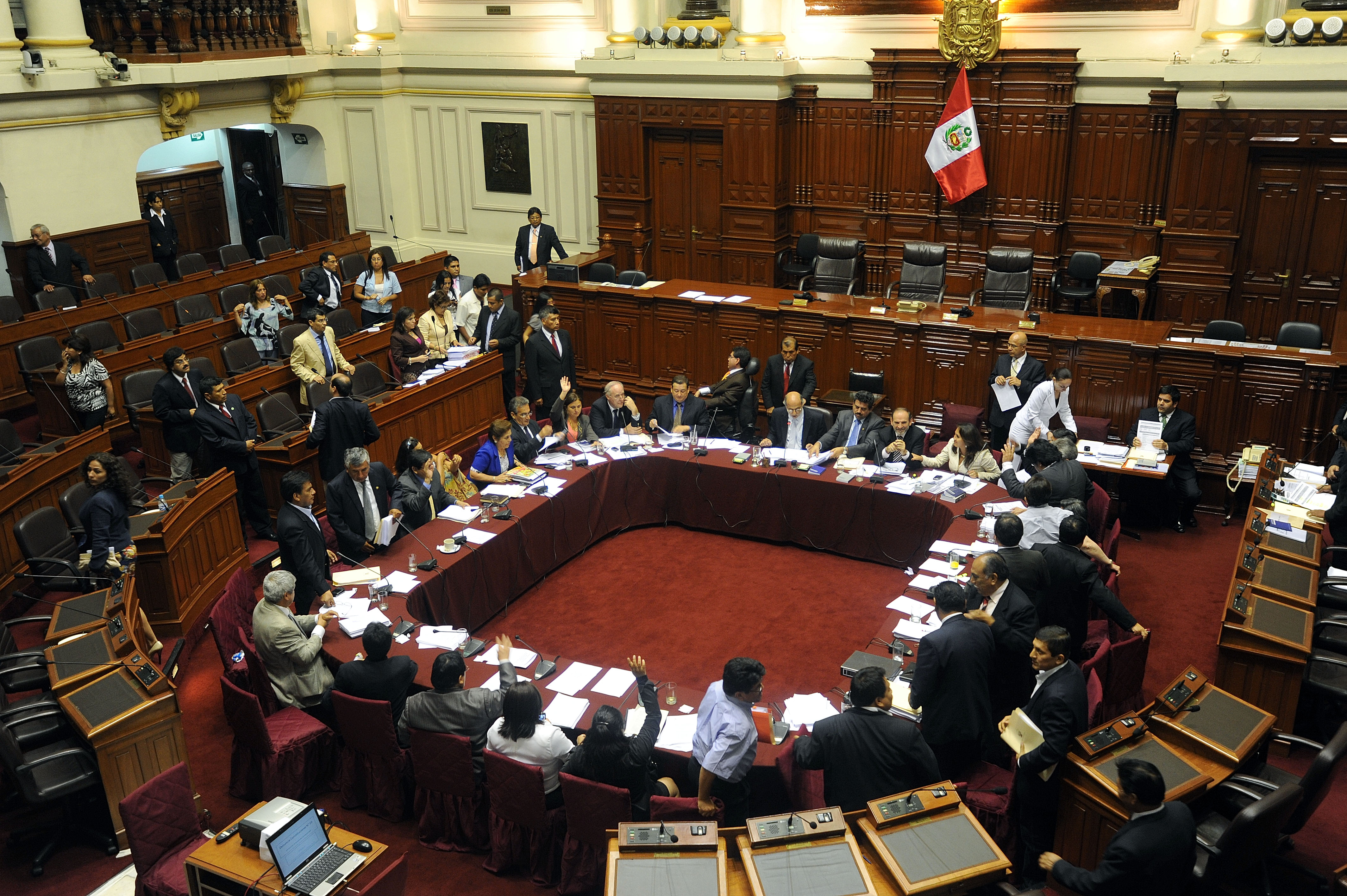 La Comisión Permanente del Congreso, que preside el titular del Poder Legislativo, Daniel Abugattás, acordó el martes 17 rechazar y archivar el Informe Final de la Subcomisión de Acusaciones Constitucionales, que recomendaba acusar al legislador Omar Chehade, por presunta comisión del delito de patrocinio ilegal y por supuesta infracción constitucional.